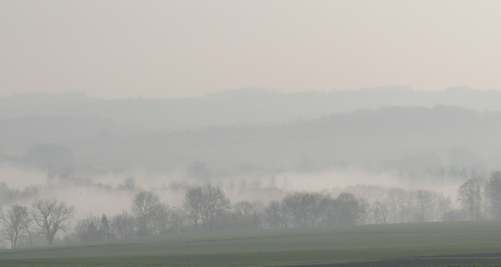 Brume d'un matin de printemps, dans la vallée des Évoissons (Somme - Picardie - France).